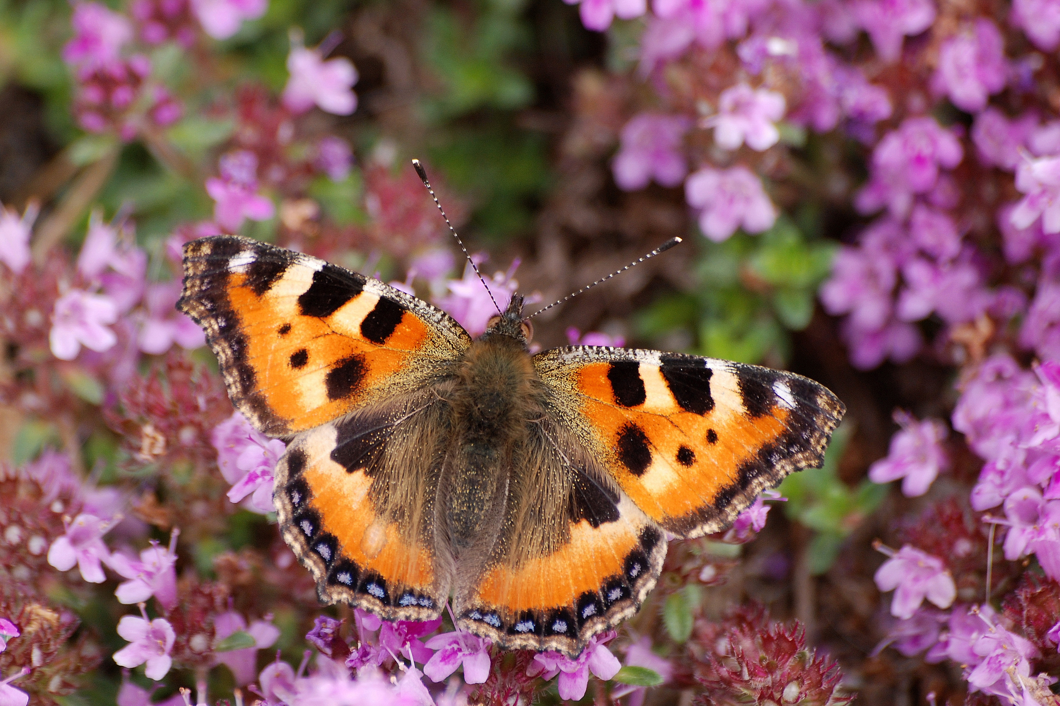 Koerliblikas (Aglais urticae), üks tavalisimaid Eesti päevaliblikaid kanarbikul.